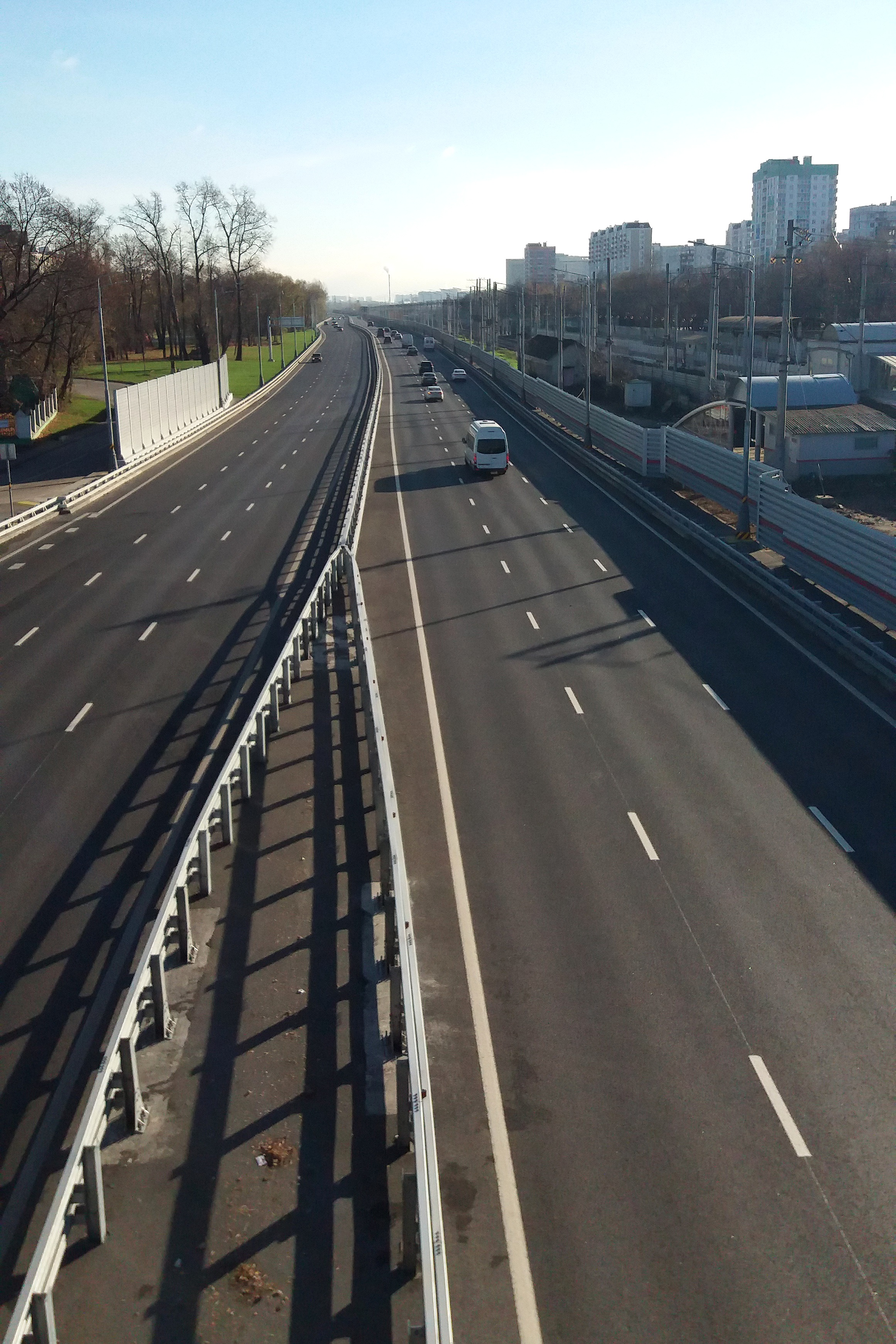 Москва. Новая дорога в рамках СВХ в Вешняках (ноябрь 2018г). Участок открыт 4 сентября 2018 года. Вид на восток с Вешняковского путепровода (ул. Паперника - Юности). Слева, буквально метрах в тридцати от ограждения дороги - церковь Успения в Вешняках.